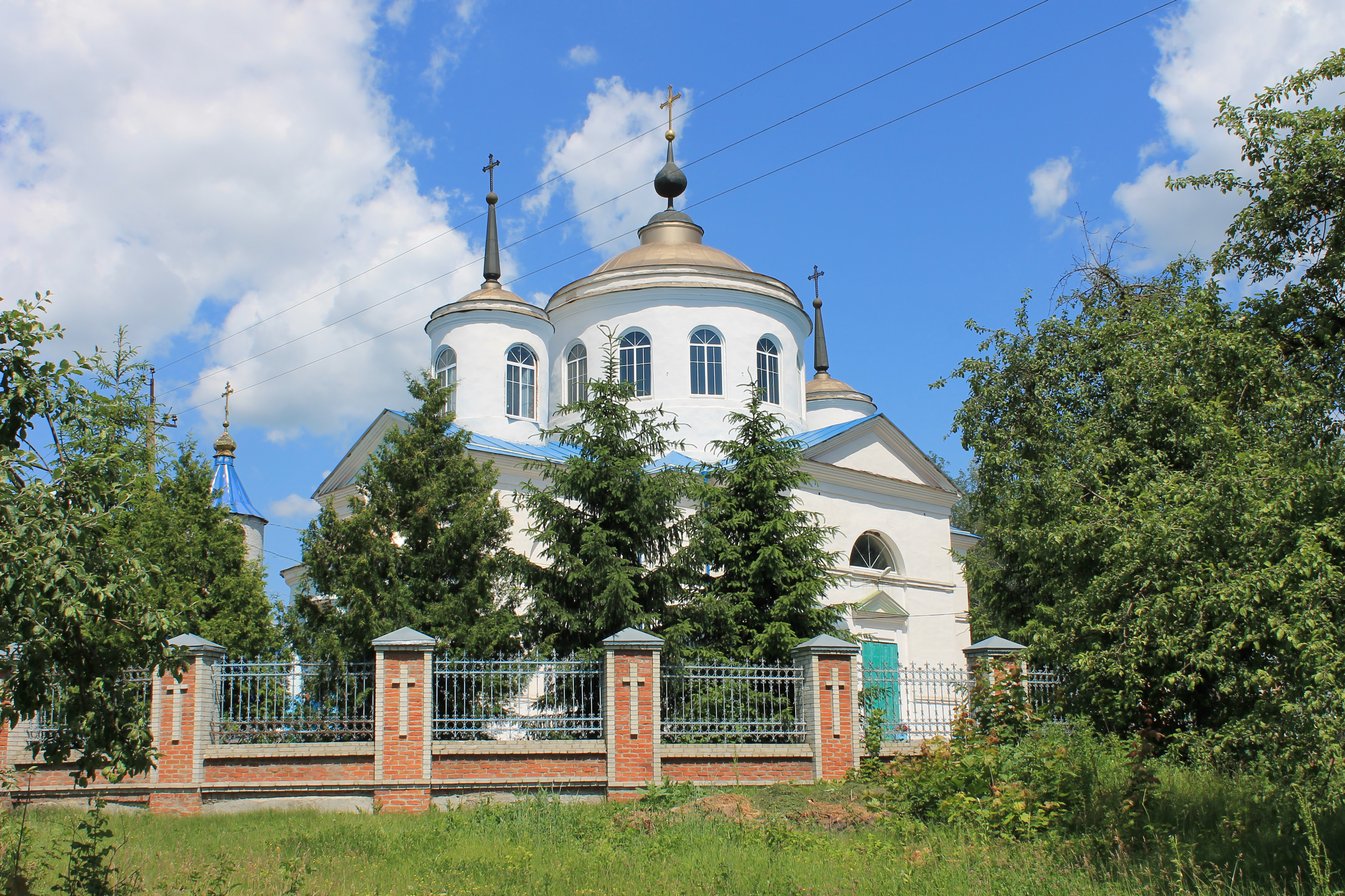 Покровська церква 1809 р., Архітектор П.А. Ярославський, с.Пархомівка, Краснокутський р-н., Харківська обл.